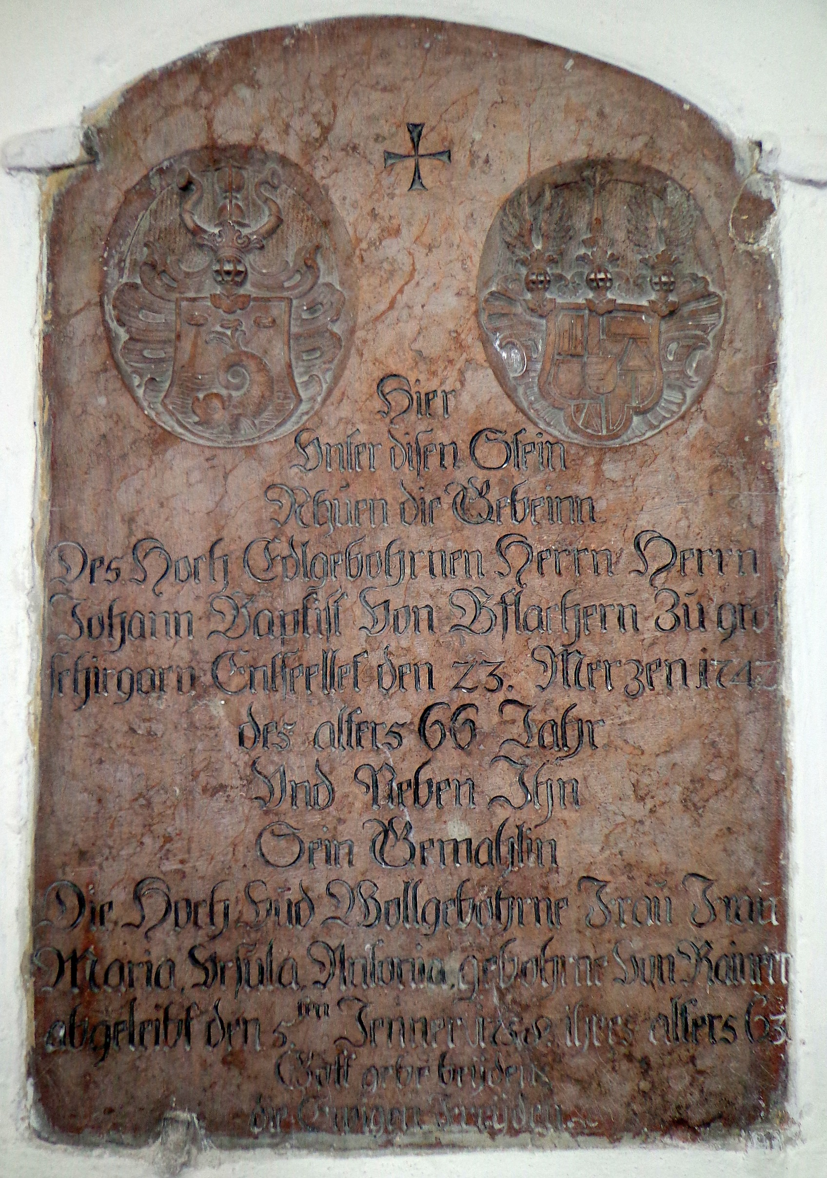 Grabdenkmal des Johann Baptist von Pflachern (+ 1742) und seiner Gemahlin Maria Ursula Antonia geb. von Rainer (+ 1758) in der Pfarrkirche von Andorf. Eine wissenschaftliche Bearbeitung des Denkmals liegt vor in SEDDON Christopher R., Die inschriftlichen Denkmäler der Herren und Freiherren von Hackledt. Grablegen, Memoria und Repräsentation eines Innviertler Landadelsgeschlechtes, Wien (Dipl. Arb.) 2002, S. 182-184.